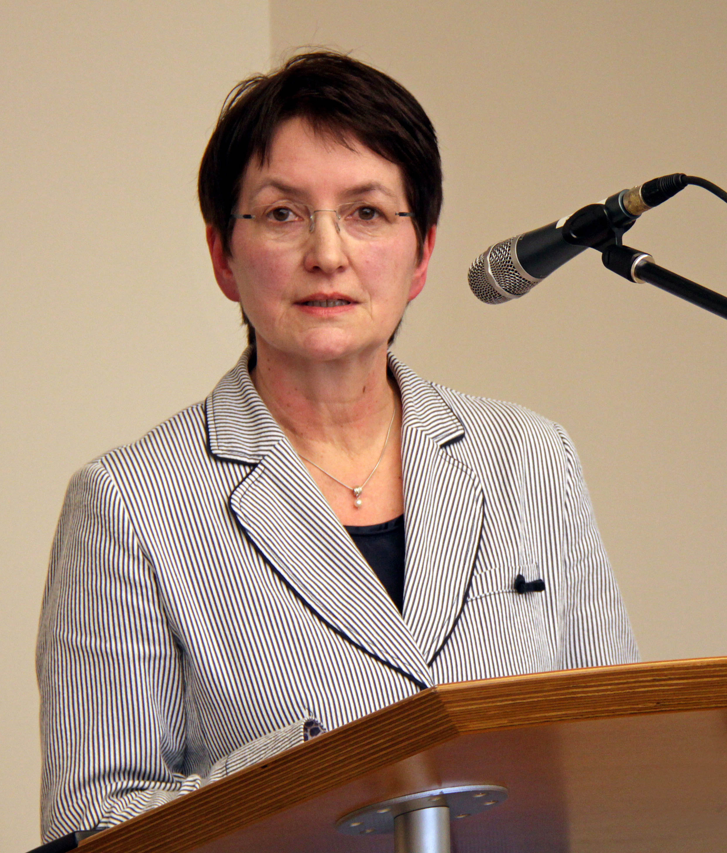 Ute Granold-Bürgermeisterin Klein-Winternheim bei der Eröffnung des "Lebendiges Museums" im Jahr 2014